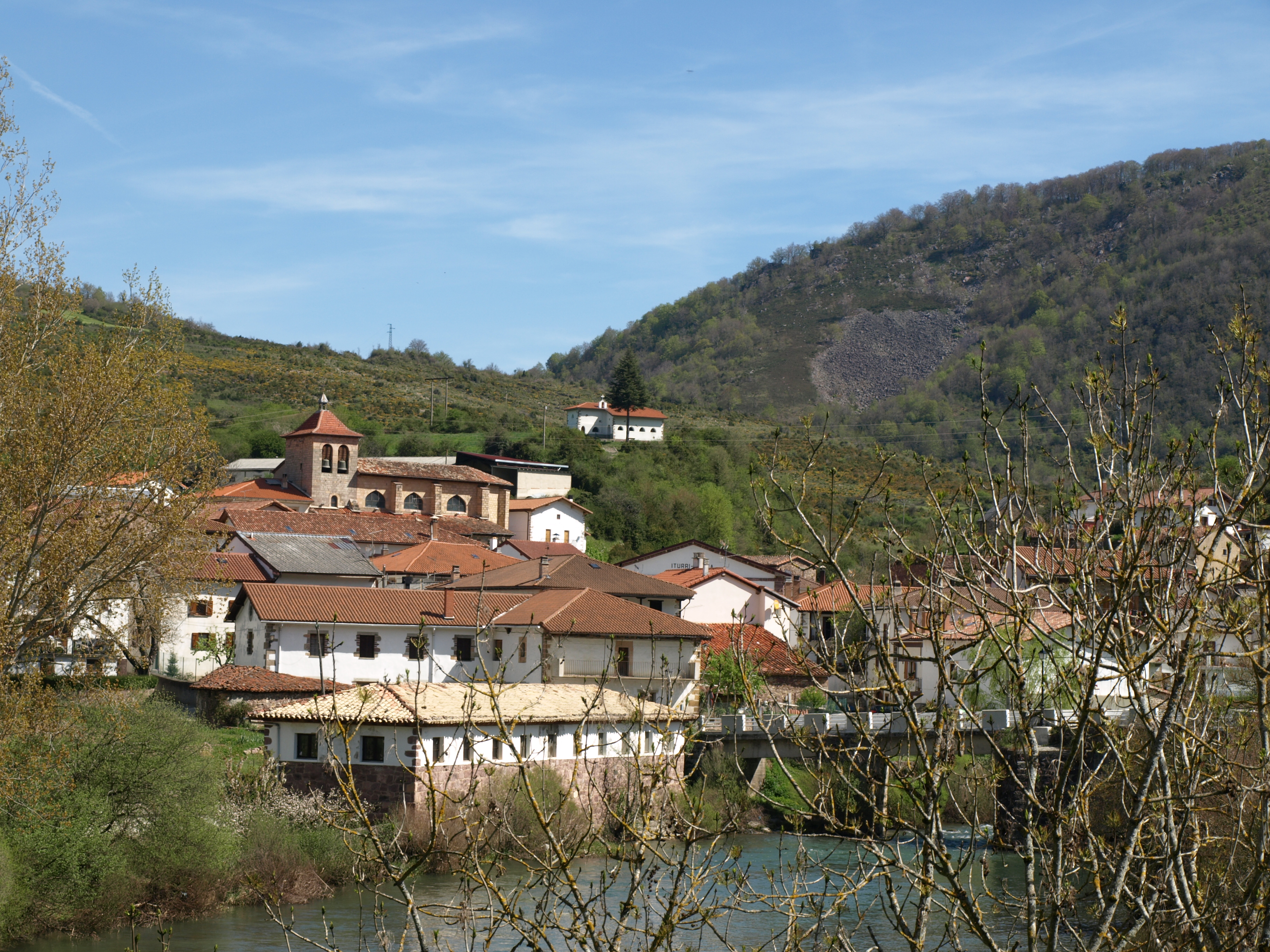 Oroz-Betelu (Navarra)